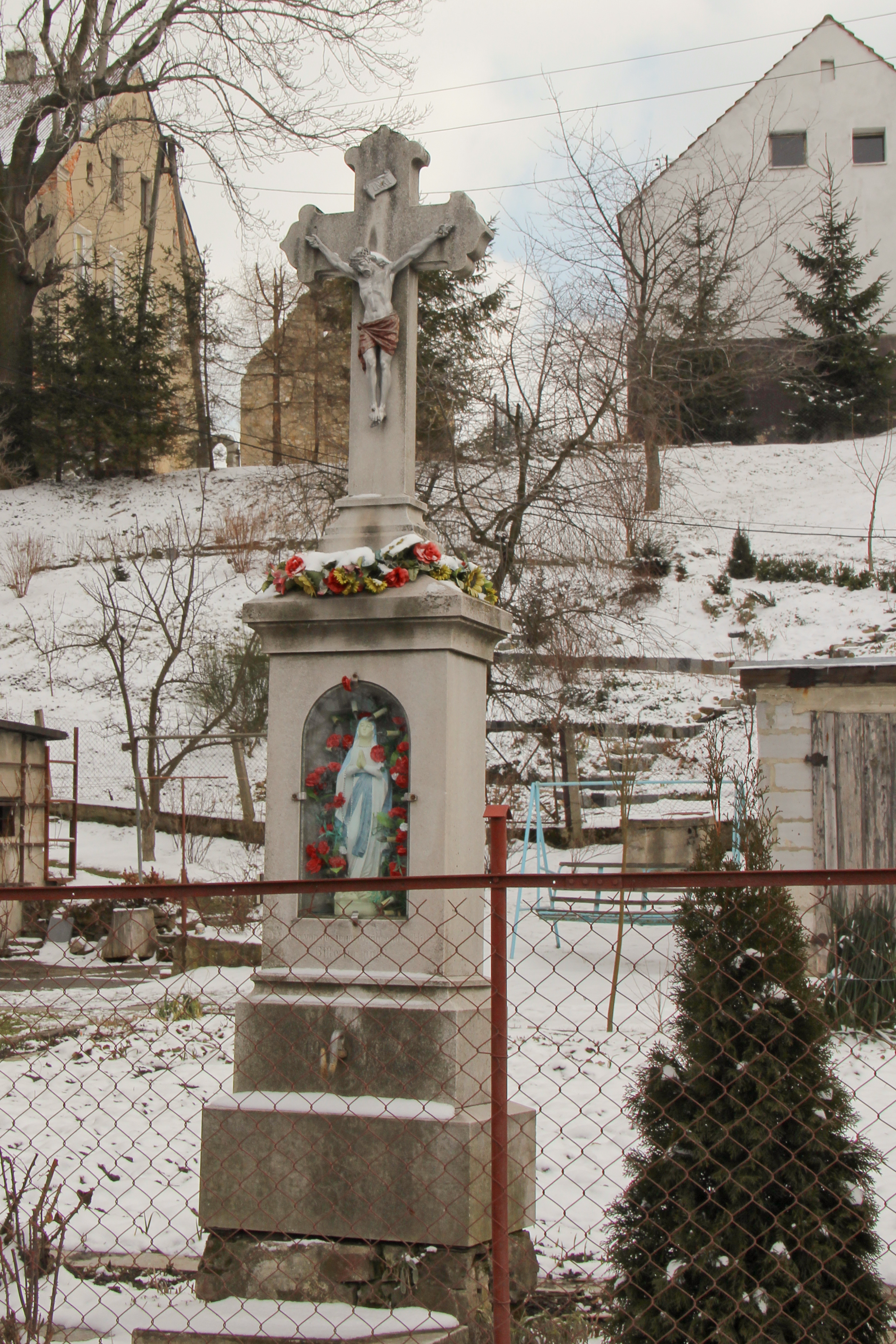 Sławniowice – wieś w Polsce, w województwie opolskim, w powiecie nyskim, w gminie Głuchołazy.